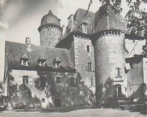 Château de La Caze, à Peyrusse-le-Roc, dans le département de l'Aveyron. Vue vers 1904 rééchantillonée.